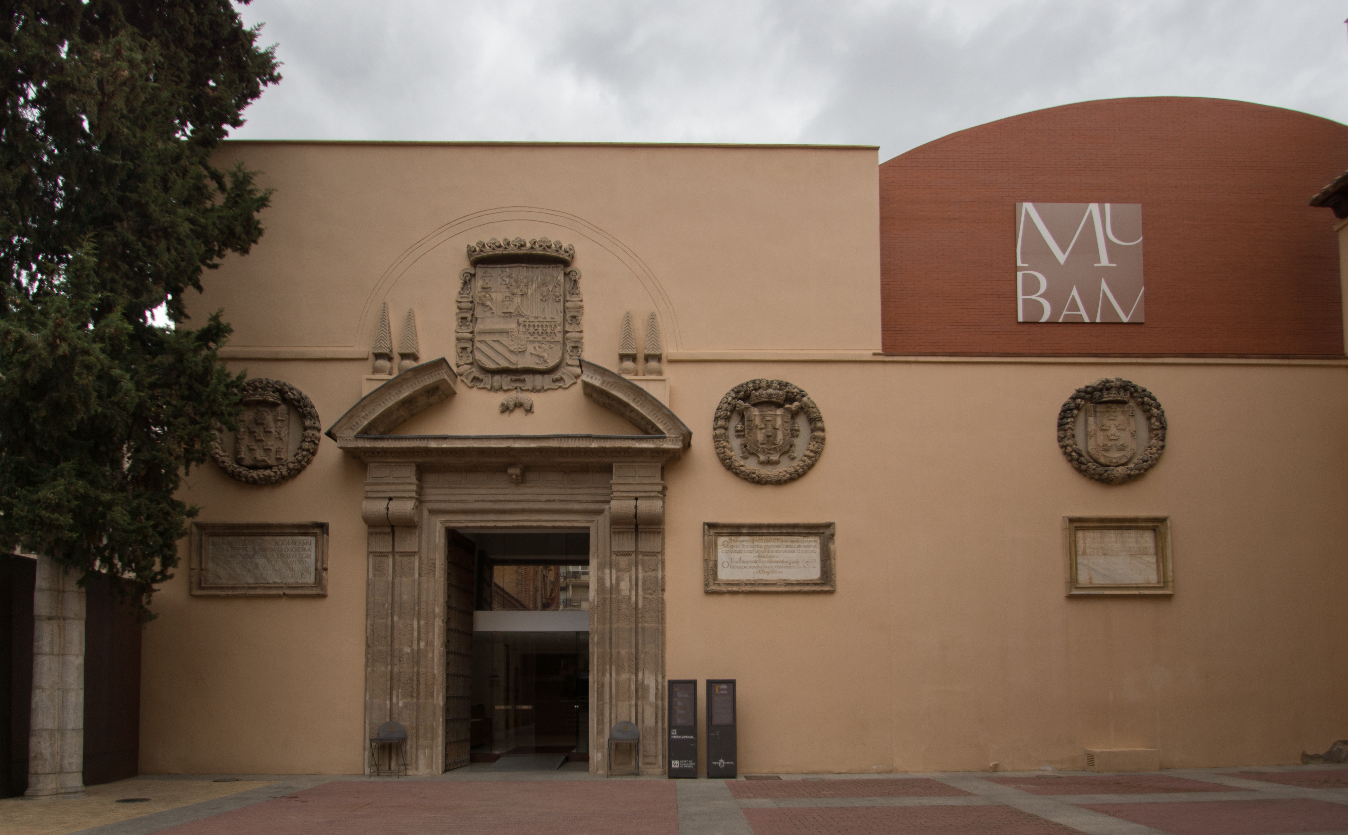 Lateral del Museo de Bellas Artes